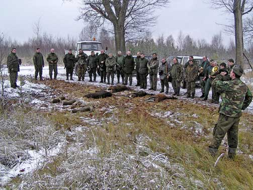 Koło myśliwskie "Ostoja", pokot po udanym polowaniu w Rudach